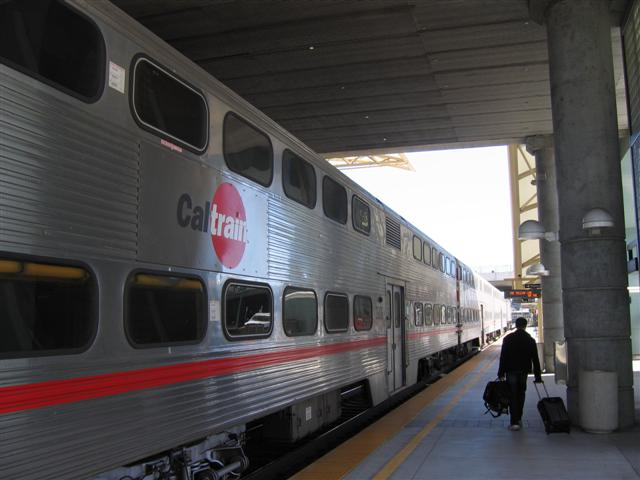 КалТрейн на гара Милбрей (авторска снимка)